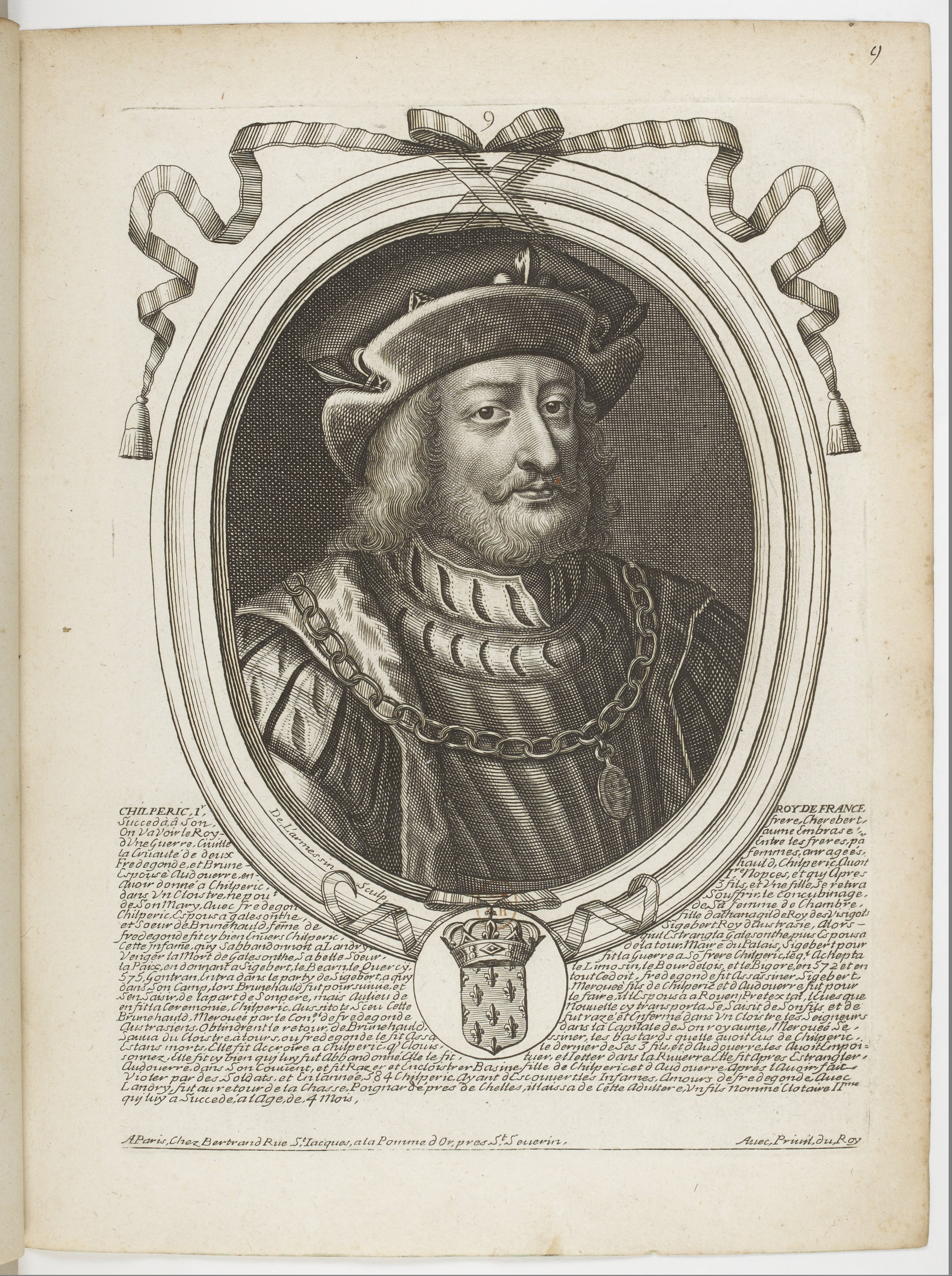 Les augustes représentations de tous les rois de France, depuis Pharamond jusqu'à Louis XIV,... avec un abrégé historique sous chacun, contenant leurs naissances, inclinations et actions plus remarquables pendant leurs règnes